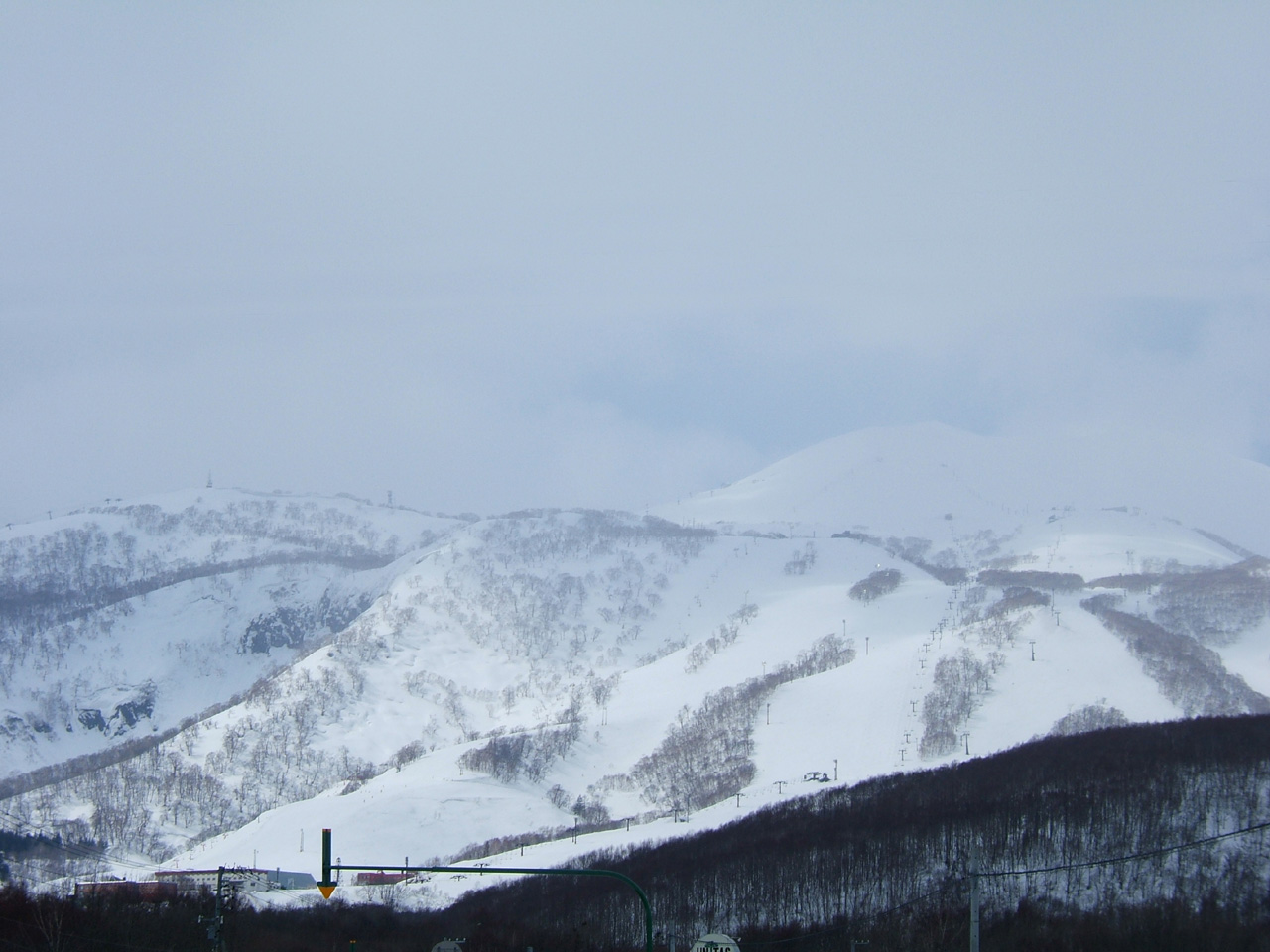 Niseko Grand-Hirafu(Kutchan, Hokkaido) Photo by Nobuo Ogasawara